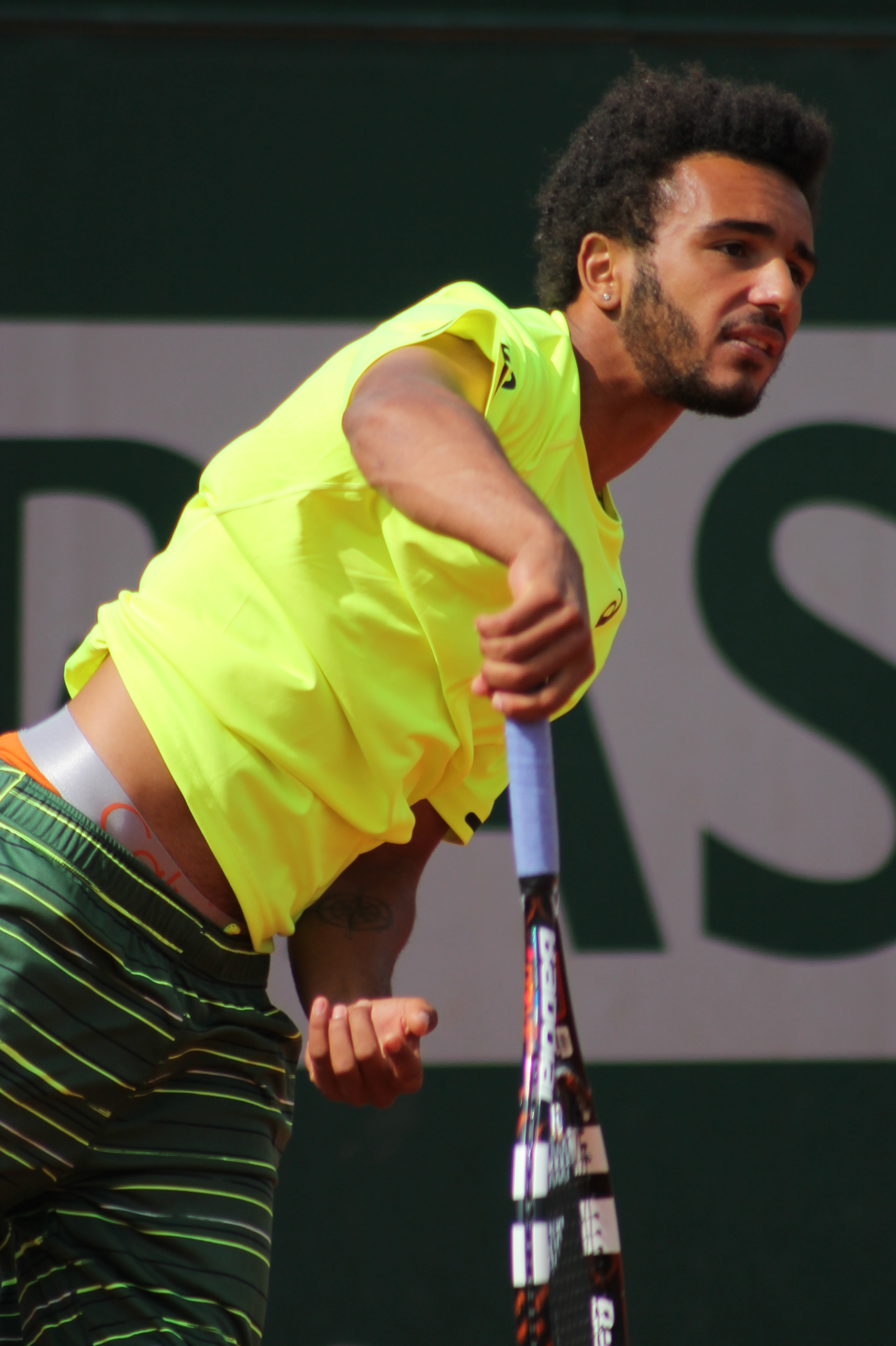 Hamou RG15 (7)